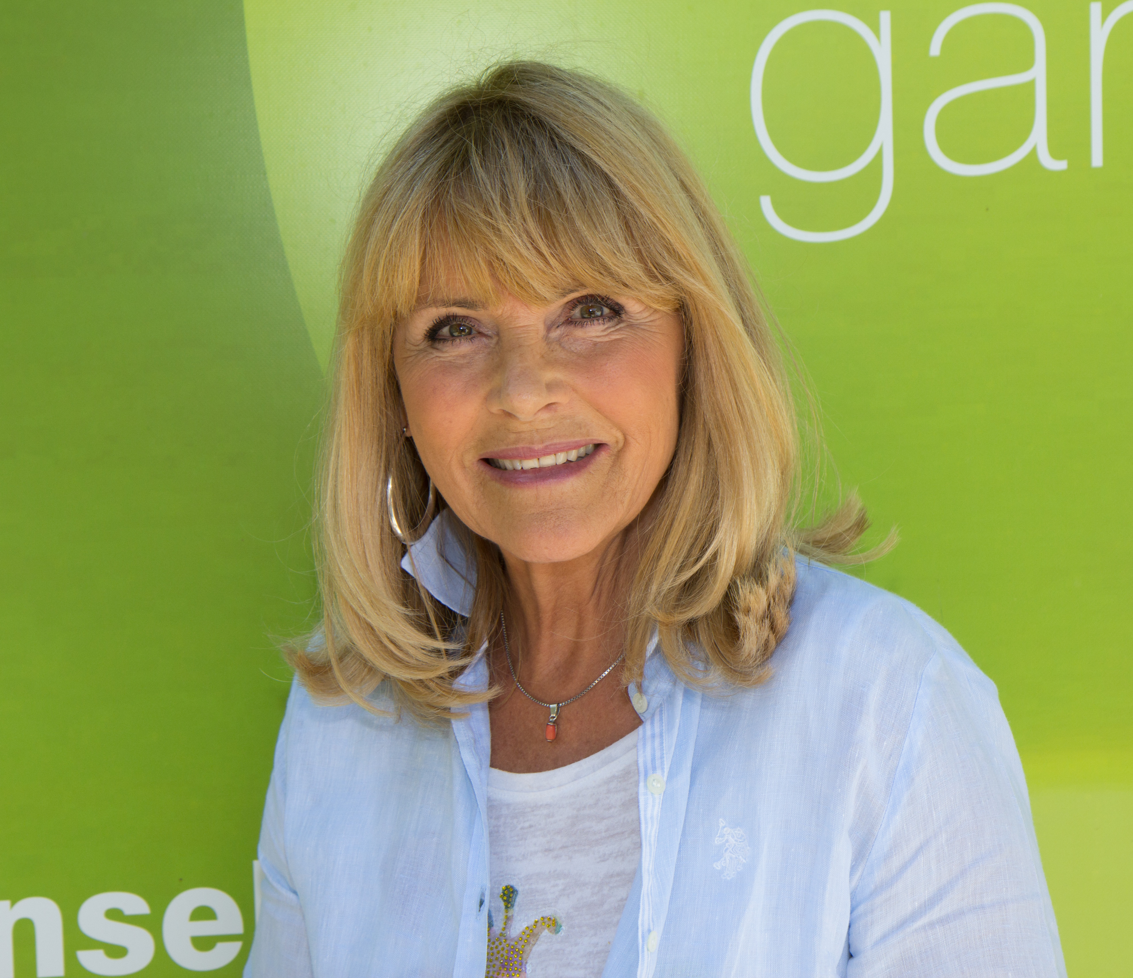 Lena Valaitis als Gast im ZDF-Fernsehgarten am 19. August 2018 in Mainz.